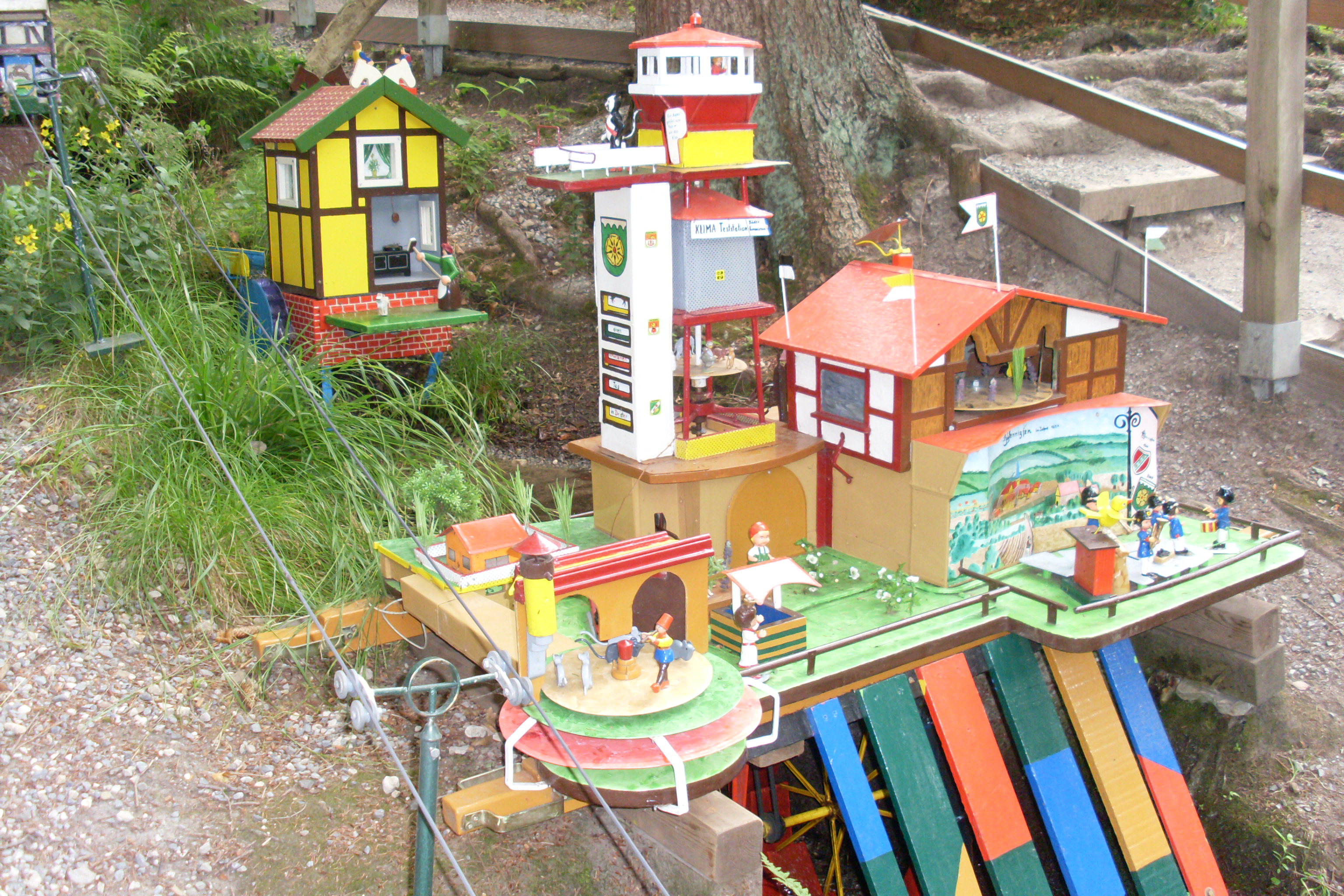 Die "Wennigser Wasserräder" sind Miniaturwassermühlen und Märchenszenen, die durch die Wasserkraft eines kleinen Bergbachs angetrieben werden.